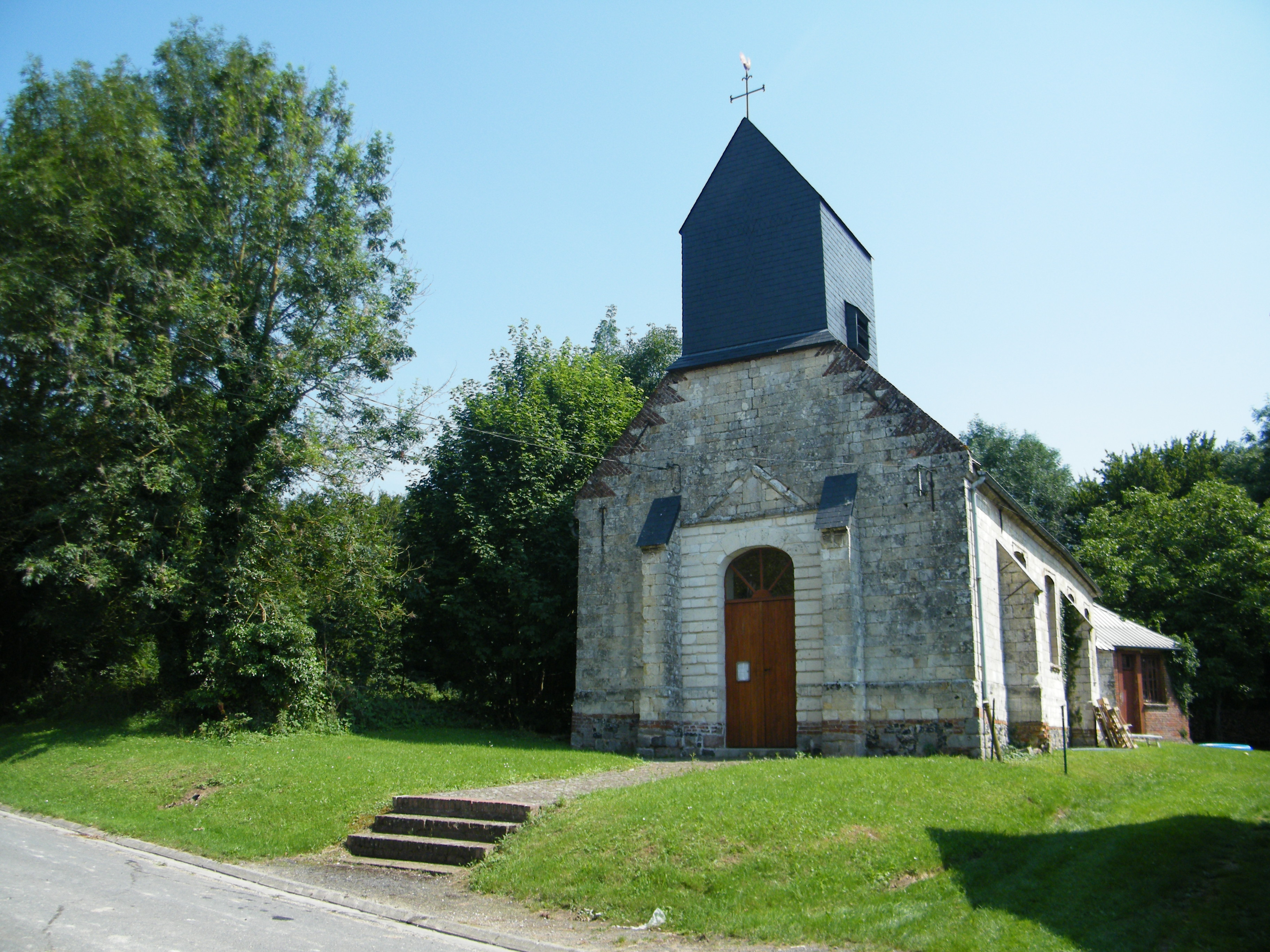 L'église saint-Nicolas de Bayencourt, Somme, France.